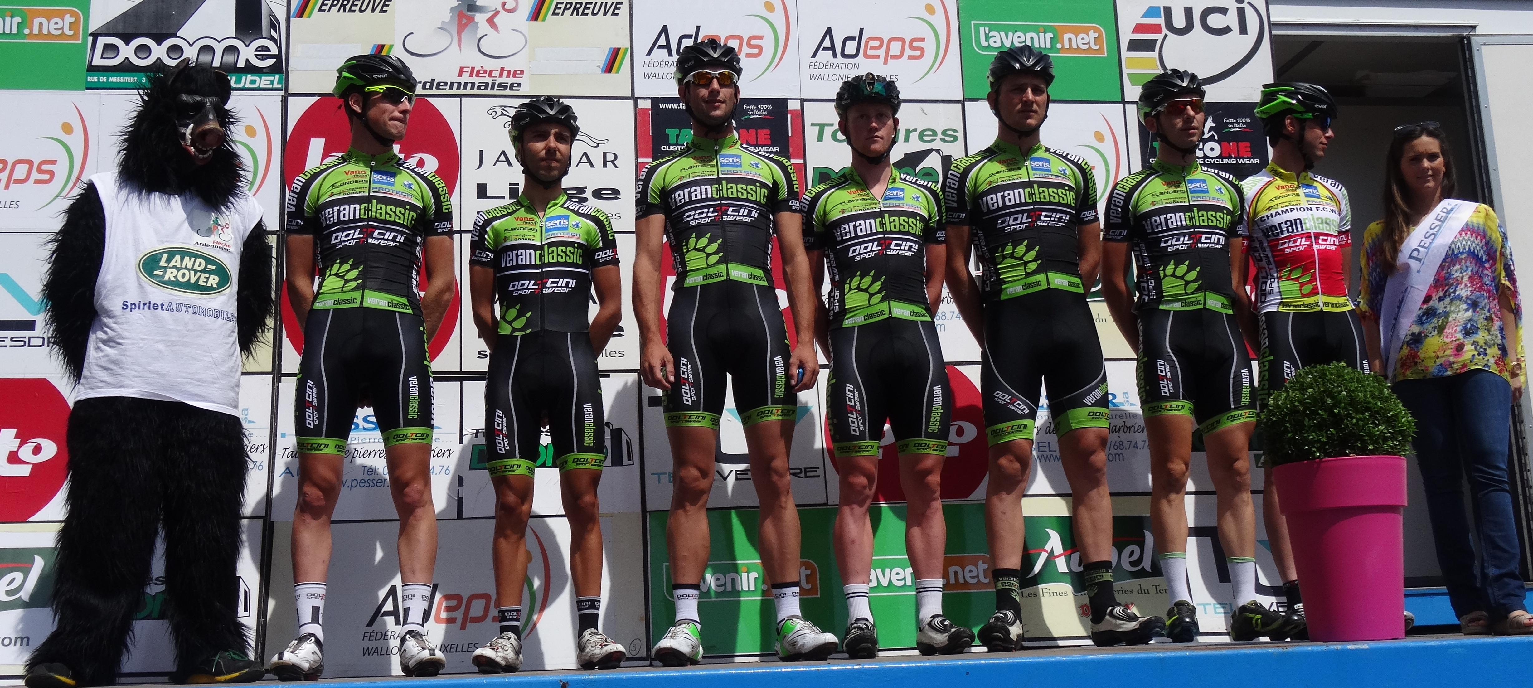 Reportage photographique réalisé le dimanche 22 juin à l'occasion du départ et de l'arrivée de la Flèche ardennaise 2014 à Herve, Belgique.